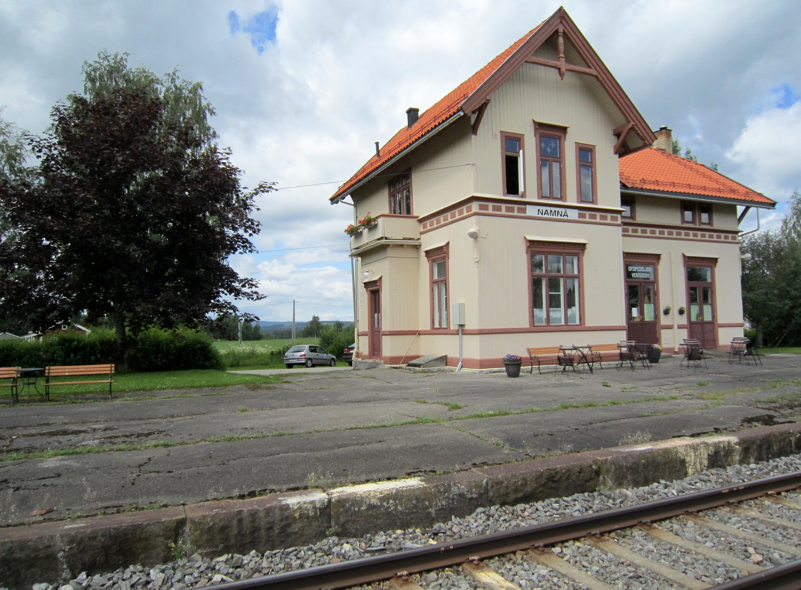 Namnå stasjon på Solørbanen